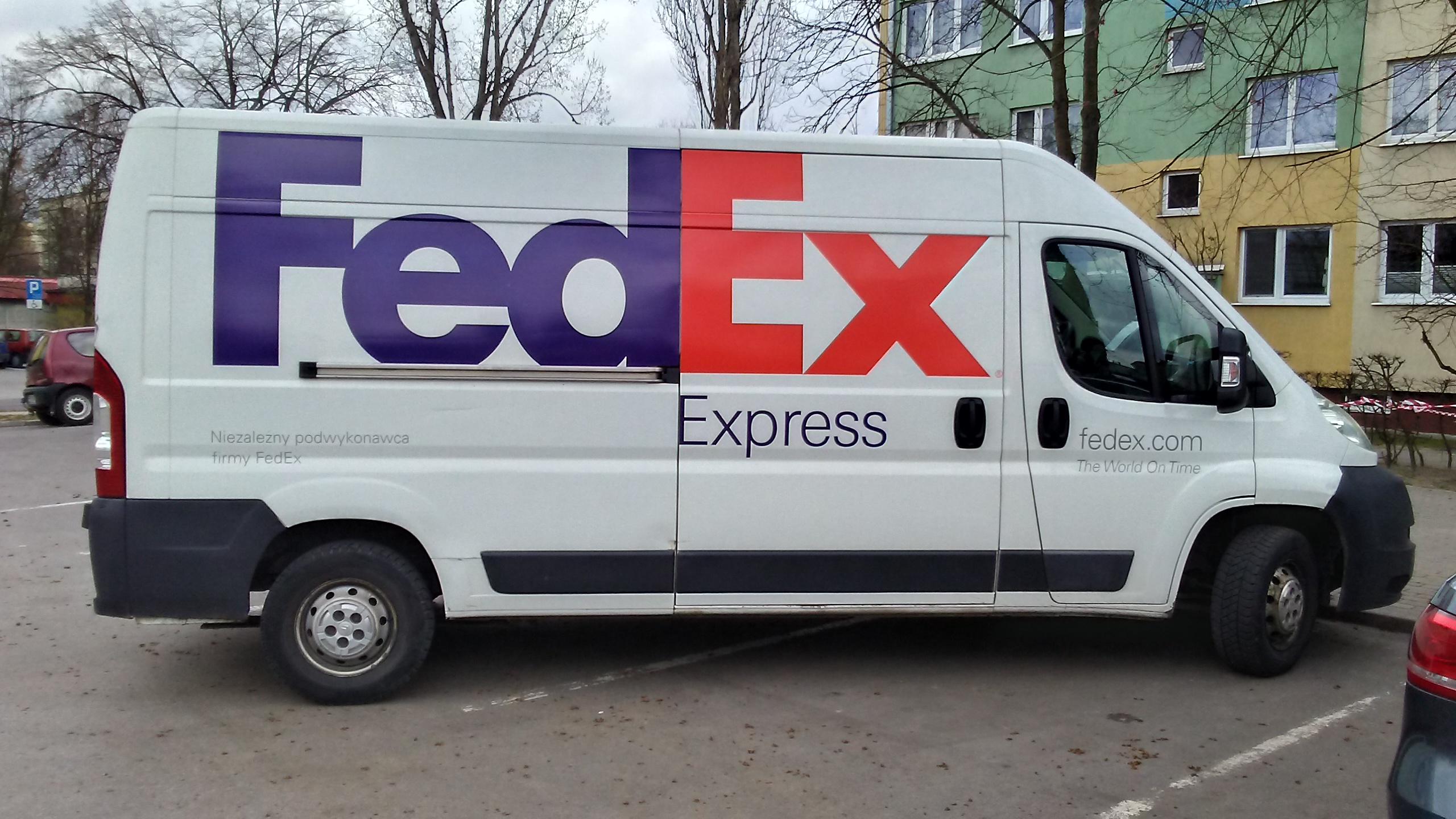 Tomaszów Mazowiecki, województwo łódzkie, ulica Strzelecka, samochód firmy kurierskiej FedEx. PL,EU, CC0